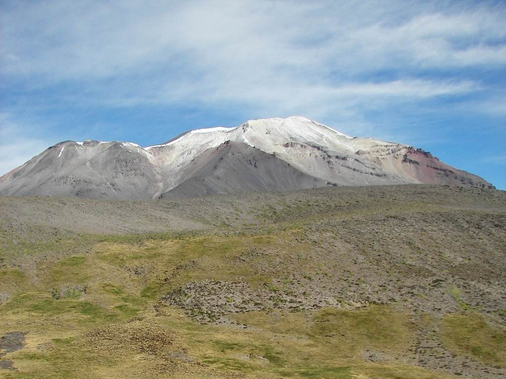 Ampato von Westen